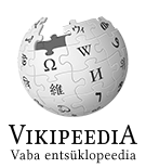 Wikipedia logo 2.0 (et)